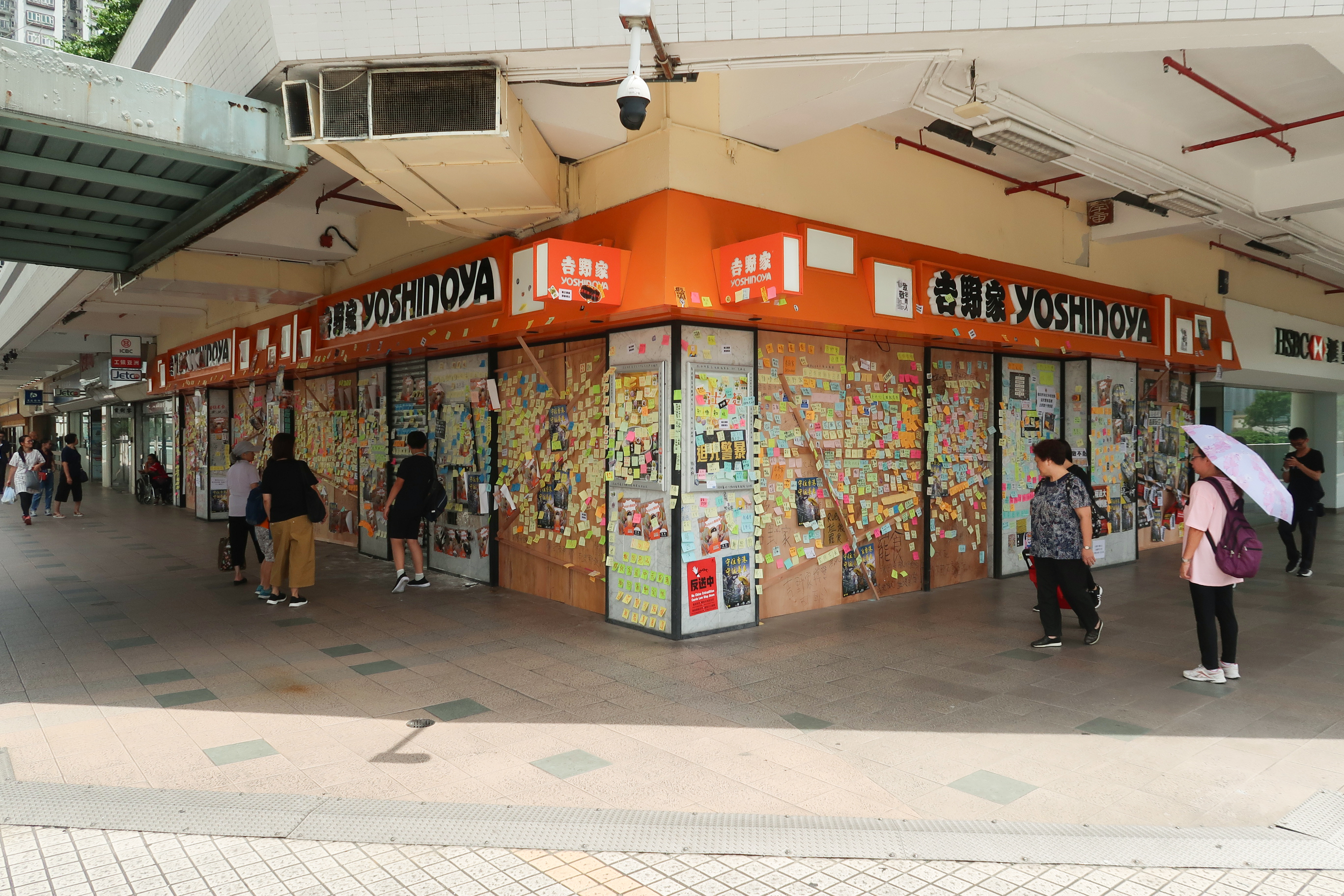 Lucky Plaza yoshinoya Lennon Wall